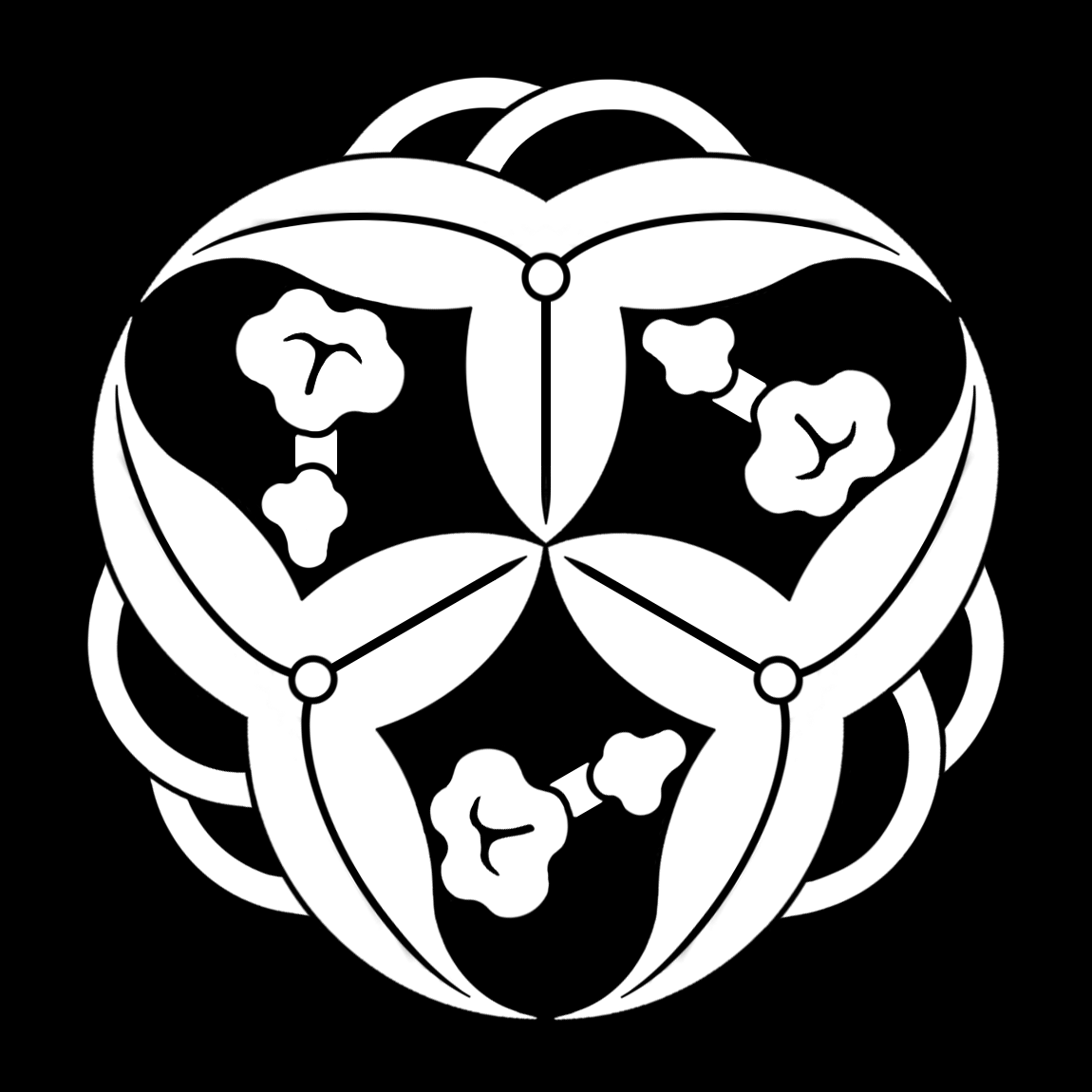 「三つ寄せ変わり澤瀉」紋（染抜）